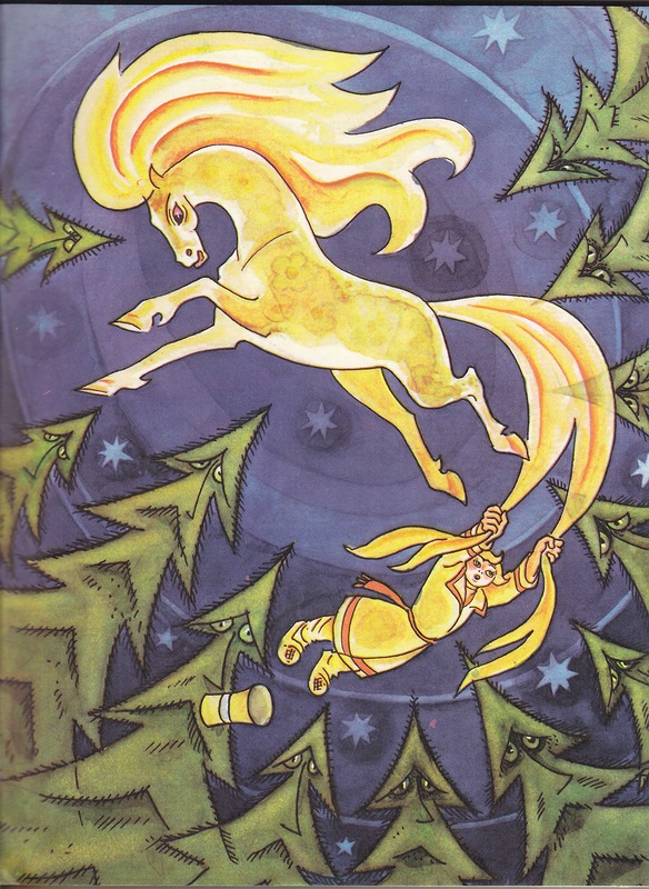 Иллюстрация к сказке "Конек Горбунок". Художник Д. А. Брюханов